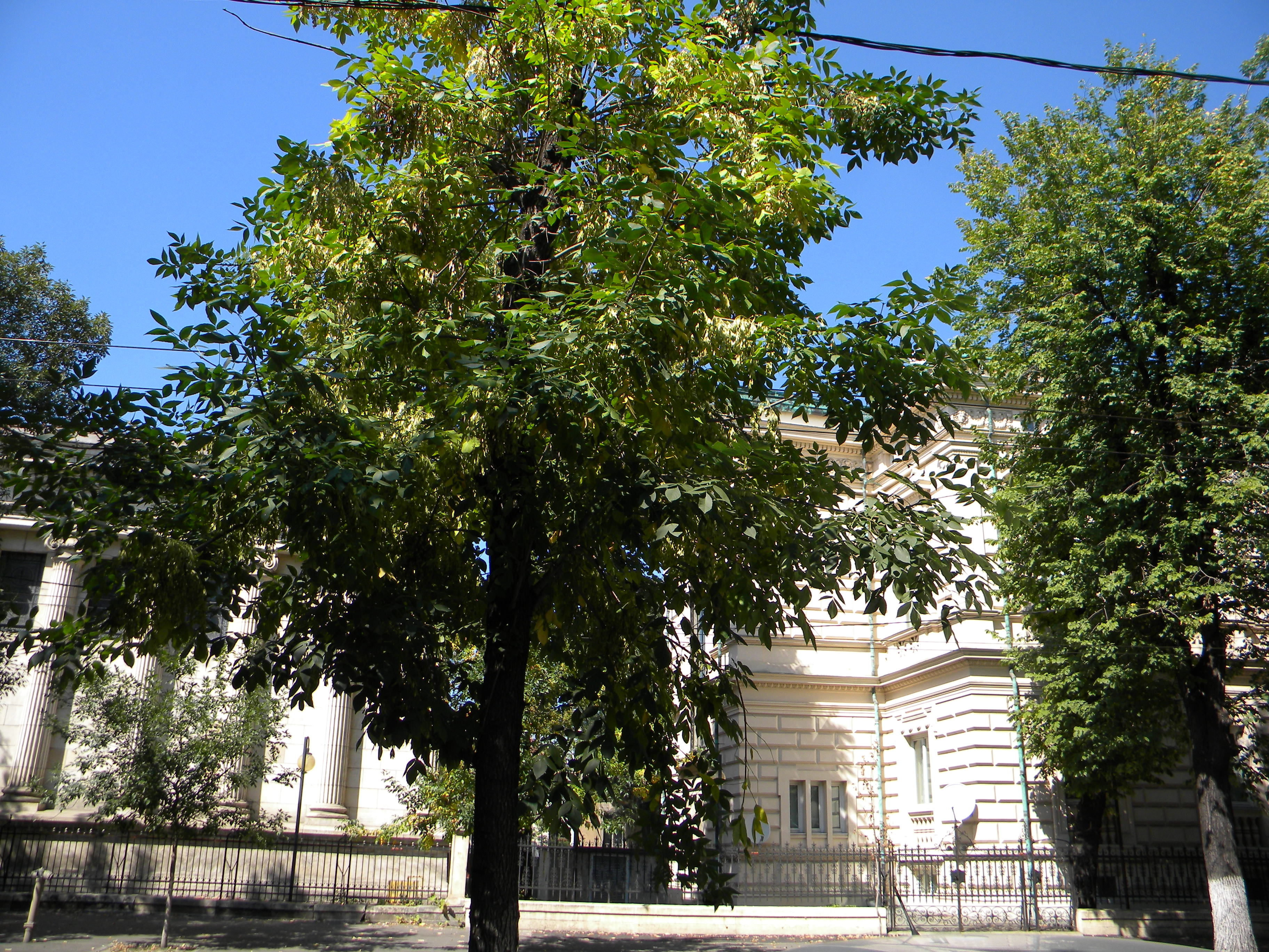 Bucuresti, Romania, Fostul Palat al Legatiei Elene azi Ambasada Republicii Elene, Bd. Pache Protopopescu nr. 1-3, sect. 2